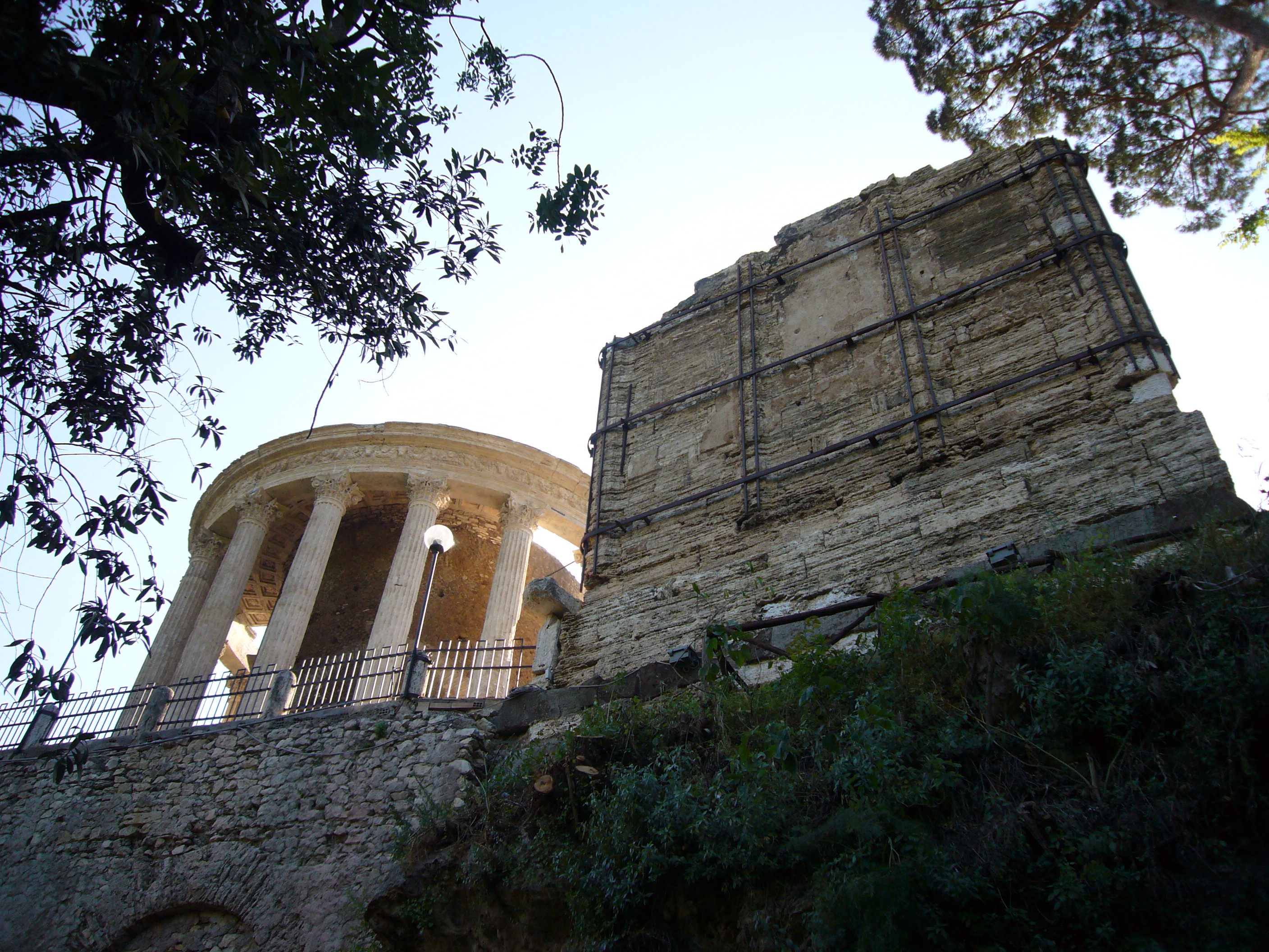 Tivoli: i templi dell'Acropoli da Villa Gregoriana